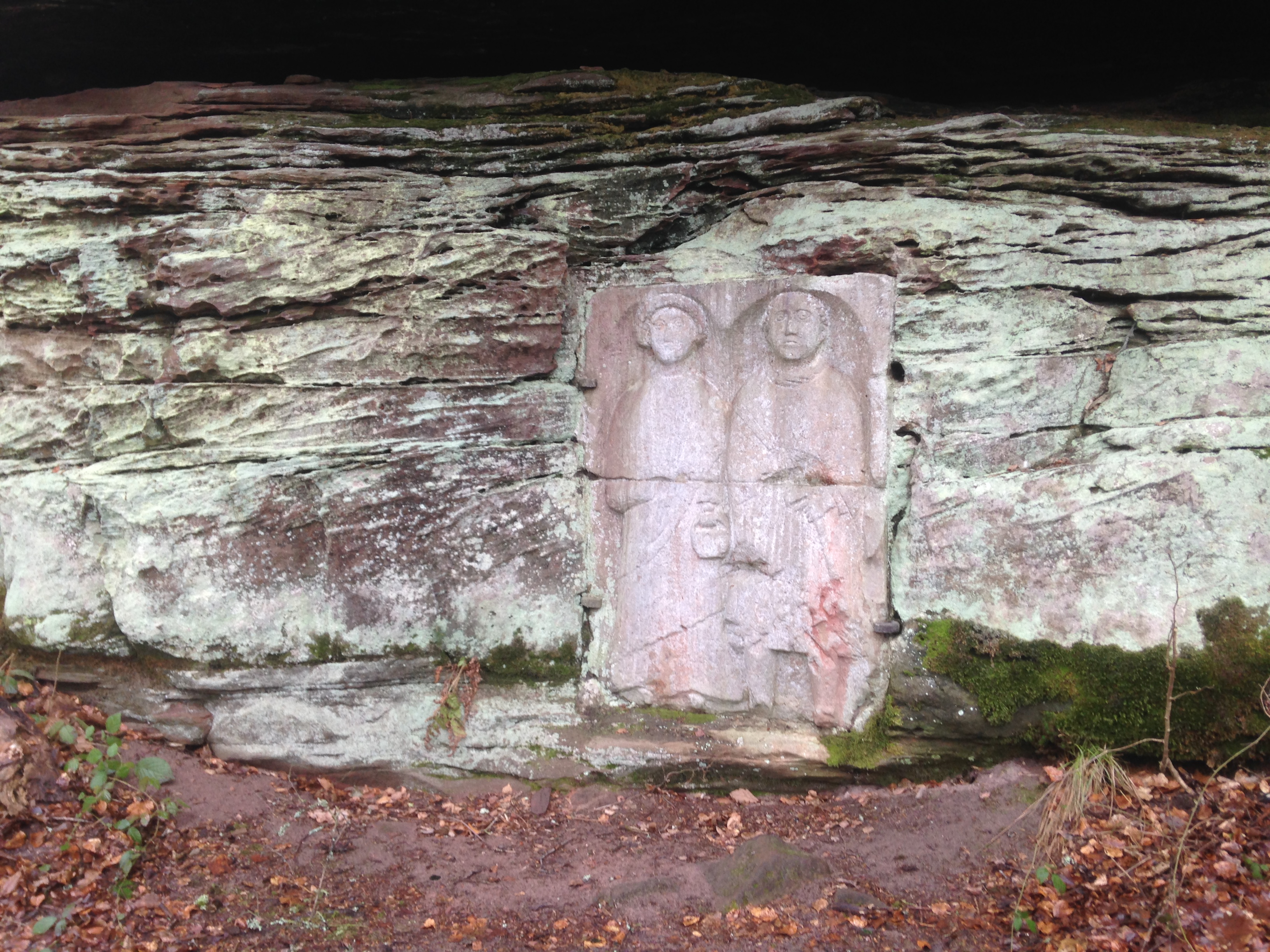 Das Replik einer Grabplatte (Der Saltuarius und seine Frau)